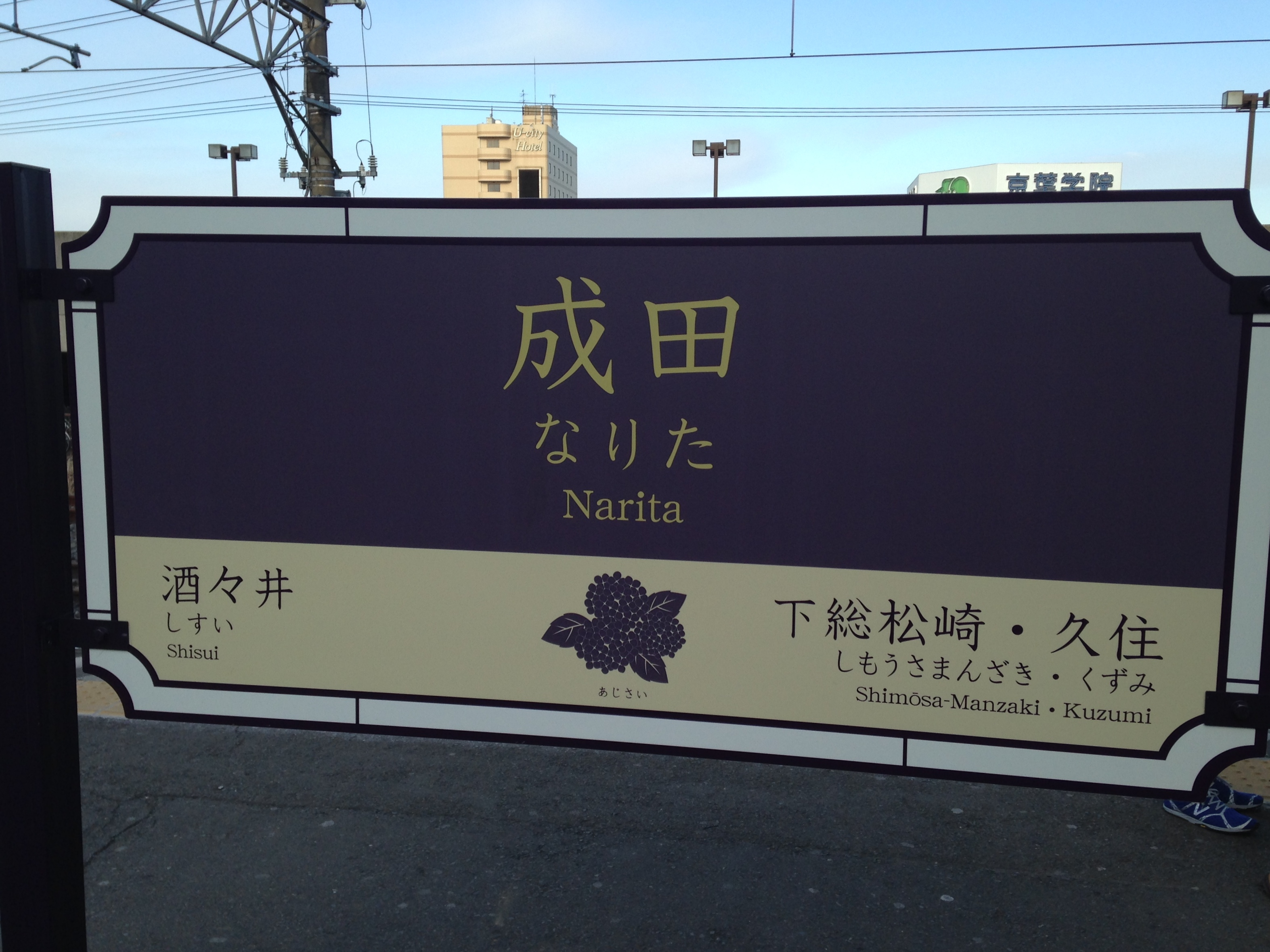 成田駅の駅名標。イラストはアジサイ